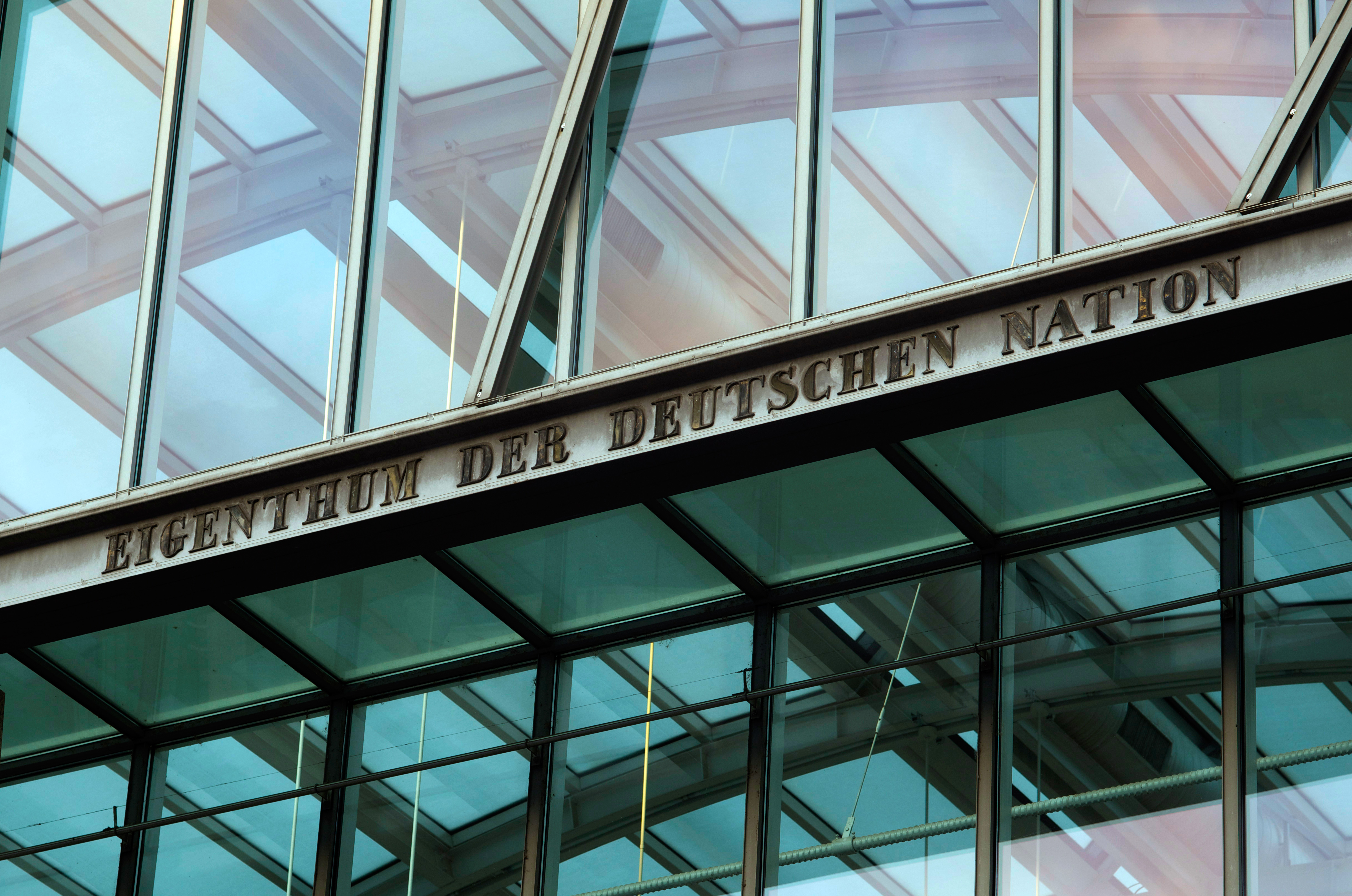 Inschrift "Eigenthum der deutschen Nation" über dem Haupteingang des Germanischen Nationalmuseums datiert in die Gründungszeit des Museums nach 1852 und wurde von Hans von und zu Aufseß in Auftrag gegeben.